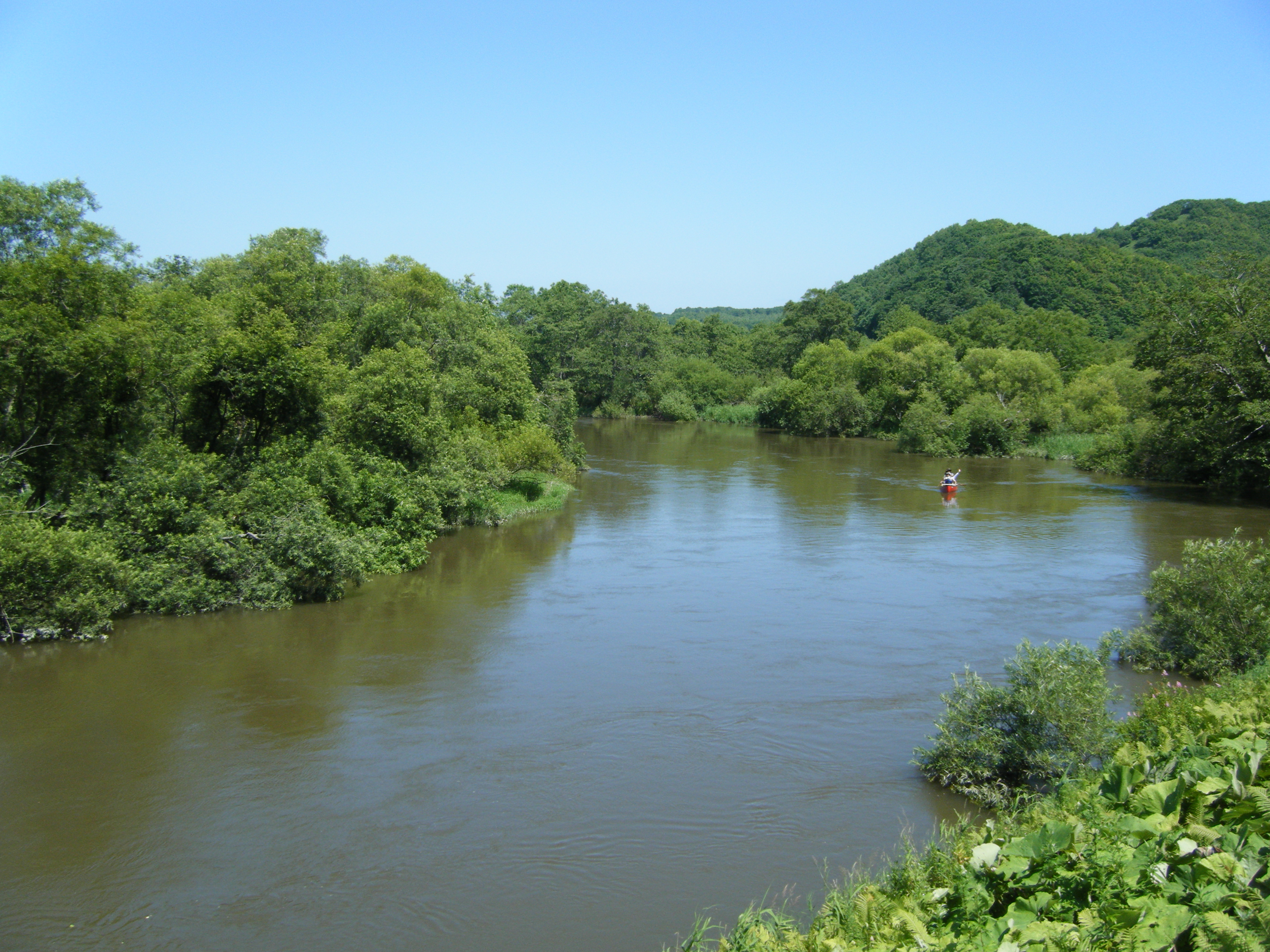 釧路川の蛇行。カヌーでの川下り。